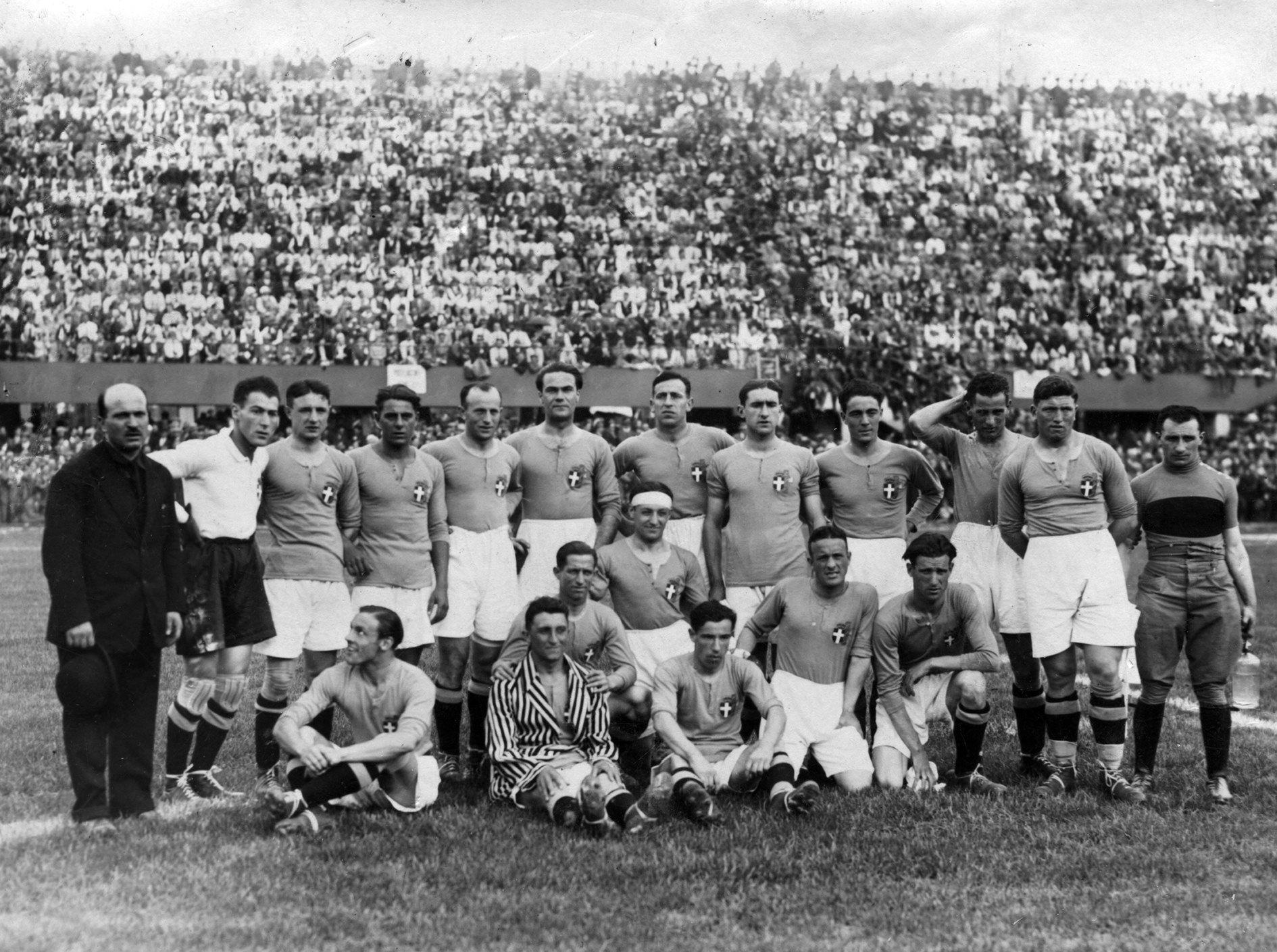 La nazionale di calcio italiana maschile. Da sinistra, in piedi: il segretario della F.I.G.C., Giuseppe Zanetti, M. Gianni, P. Genovesi, A. Ferraris (IV), A. Baloncieri, Bellini, G. Della Valle, A. Schiavio, F. Munerati, F. Bernardini, V. F. Levratto, il massaggiatore Bortolotti; in ginocchio o seduti: P. Pastore, L. Burlando, J. Libonatti, U. Caligaris, Giordani, M. Magnozzi, G. Borgato. Partita inaugurale dello stadio Littoriale di Bologna (Italia), 29 maggio 1927.